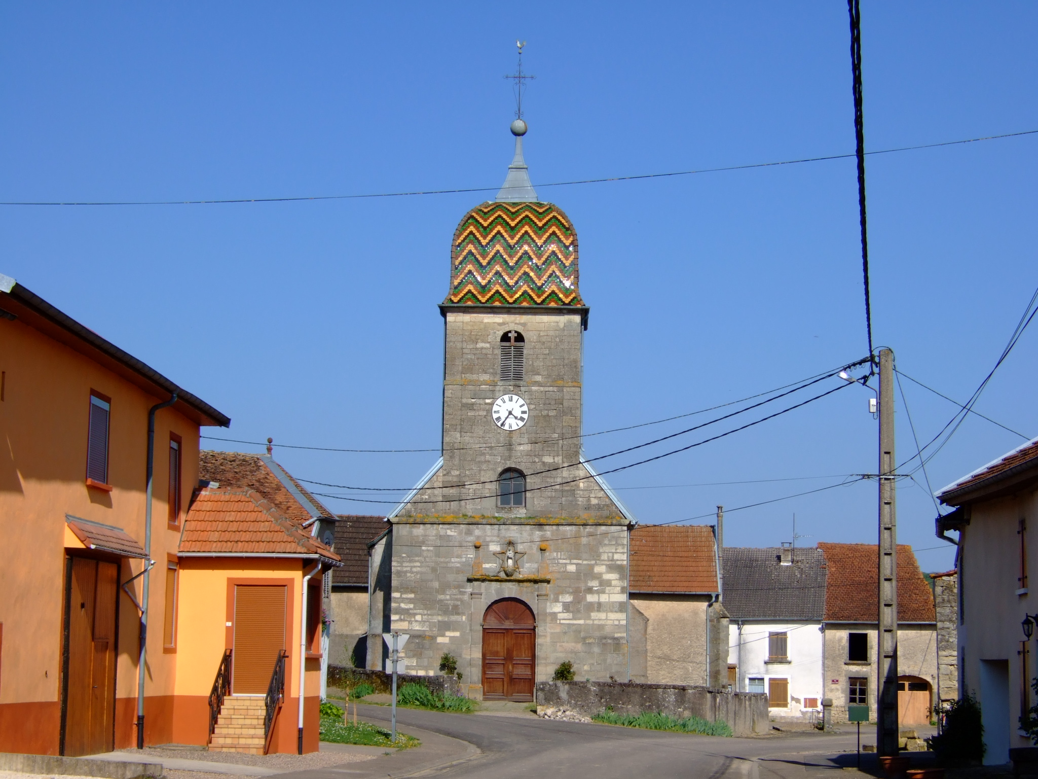 L'église de Barges (Haute-Saône)